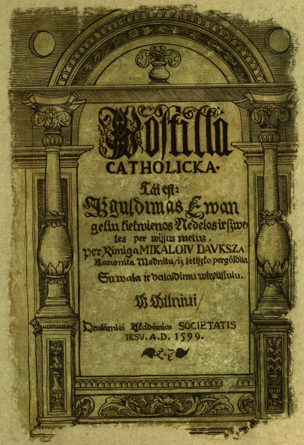 Titulinis leidinio puslapis